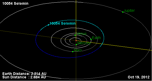 Орбита астероида (10054) Соломин